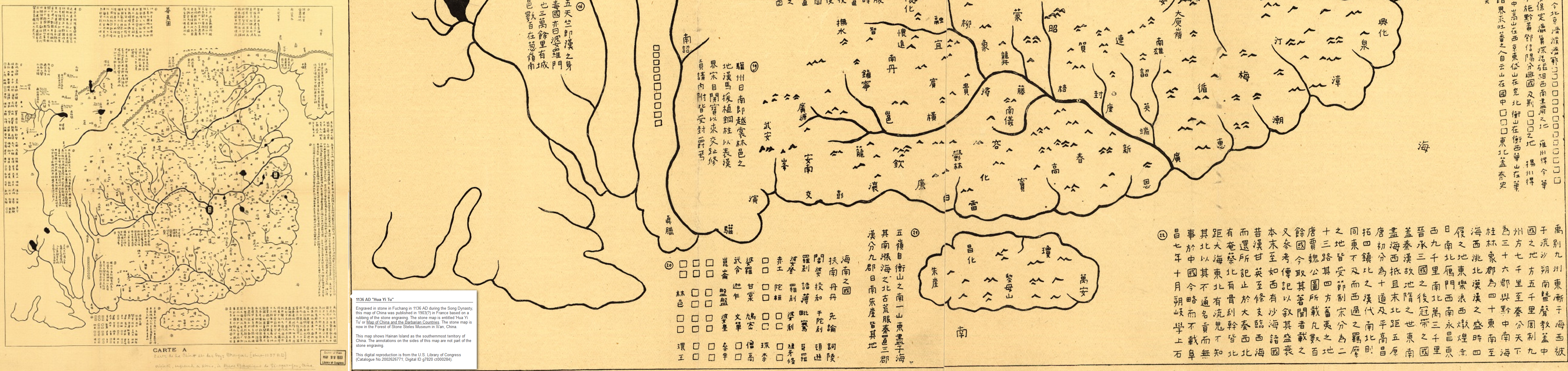 Bản đồ Cực nam Trung Hoa, trích từ bản đồ in dập khắc đá "Hua Yi Tu" 1136, xuất bẩn ở Pháp năm 1903, Chính phủ Philippin sao lại từ bản kỹ thuật số trong thư viện Quốc hội Hoa Kỳ (Catalogue No.2002626771; ID kỹ thuật số g7820 ct000284). Bản đồ này cho thấy đảo Hải Nam là cực nam của lãnh thổ Trung Quốc. (Các chú thích trên các cạnh của bản đồ này không phải là một phần của việc khắc đá.) 19(驩州,日南,即越裳,林邑之地漢。馬援植銅柱以表漢界。宋,自開寳以來,交趾修貢請内附,皆受封爵焉。/Hoan Châu, Nhật Nam tức Việt Thường, Lâm Ấp chi địa Hán. Mã Viện thực đồng trụ dĩ biểu Hán giới. Tống tự khai bảo dĩ lai, Giao Chỉ tu cống, thỉnh nội phụ, giai thụ phong tước yên./Hoan Châu, Nhật Nam tức Việt Thường, Lâm Ấp là đất nhà Hán. Mã Viện dựng trụ đồng lấy làm biên giới nhà Hán. Nhà Tống, từ năm Khai Bảo đến nay, Giao Chỉ thuận cống, thỉnh cầu quy phụ, đồng thời nhận phong tước.) 20(海南之國。扶南丹丹,尤論,訶陵。闍婆投和,于坨利,..。羅利,諸..,林邑,..。Hải Nam chi quốc. Phù Nam đan đan, vưu luận, kha lăng. Đồ Bà đầu hòa, vu đà lợi,... La lợi, chư..., Lâm Ấp,... ) 21(五嶺,自衡山,之南一山,東盡于海。其南漲海,之北古荒服,秦置三郡。漢分九郡,日南,朱崖,皆其地。/Ngũ Lĩnh, tự Hoành Sơn, chi nam nhất sơn, đông tận vu hải. Kì nam Trướng Hải, chi bắc cổ hoang phục, Tần trí tam quận. Hán phân cửu quận, Nhật Nam, Chu Nhai, giai kì địa.)